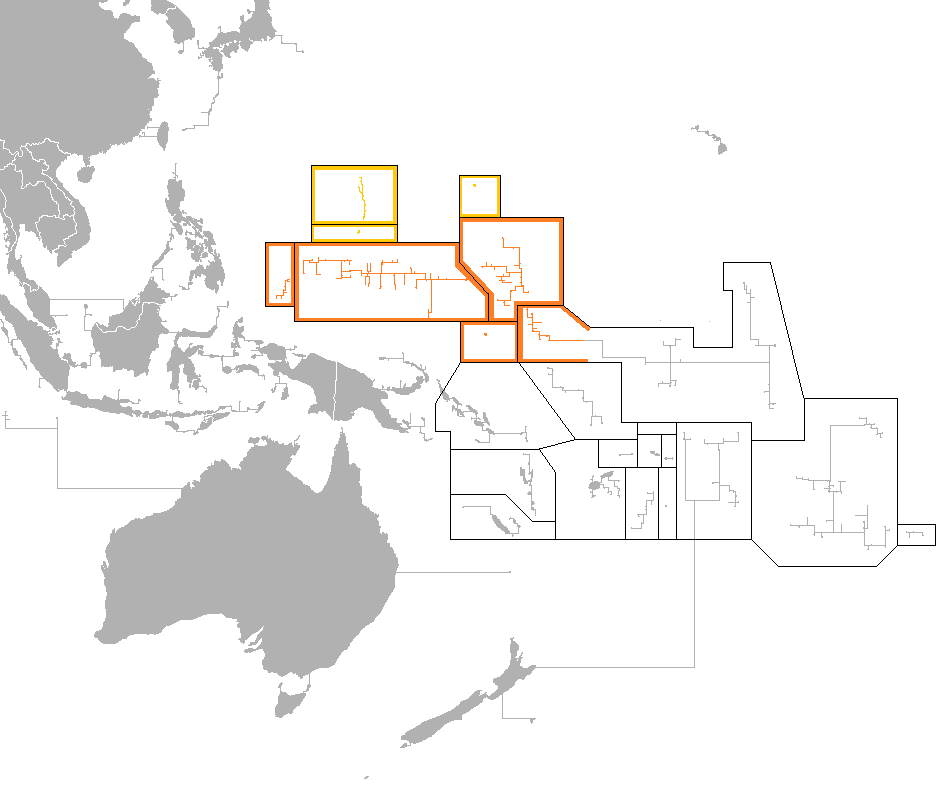 Mapa de Micronesia. Países soberanos Terrotorios dependientes